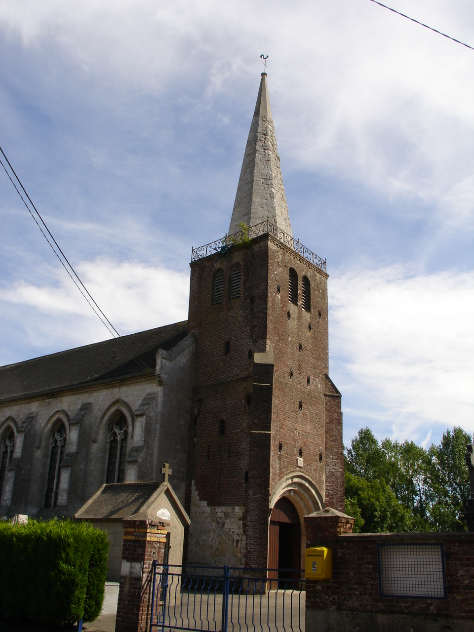 Église de Bléquin